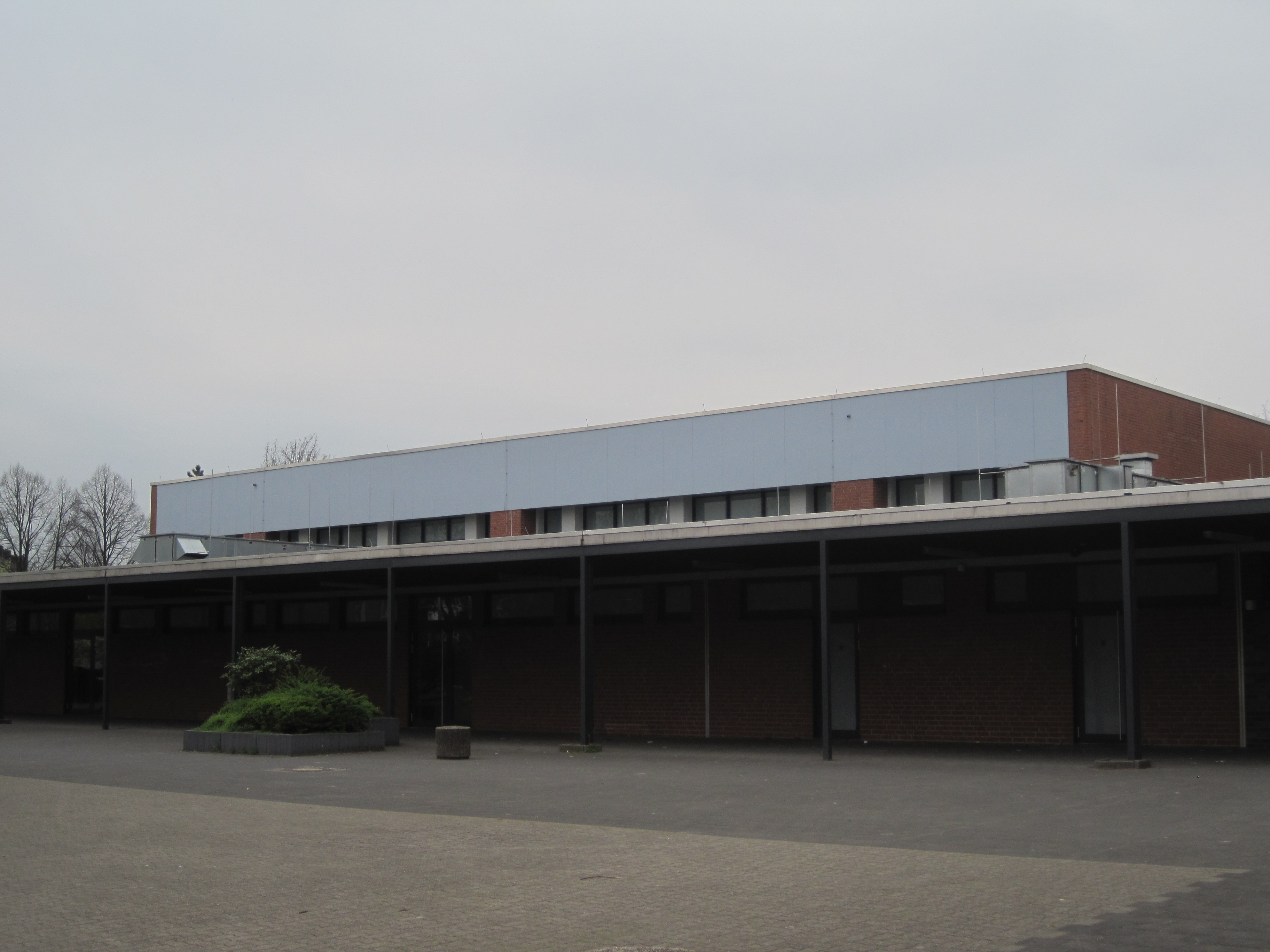 Das Foto zeigt die Dreifachsporthalle des Galilei-Gymnasiums Hamm.